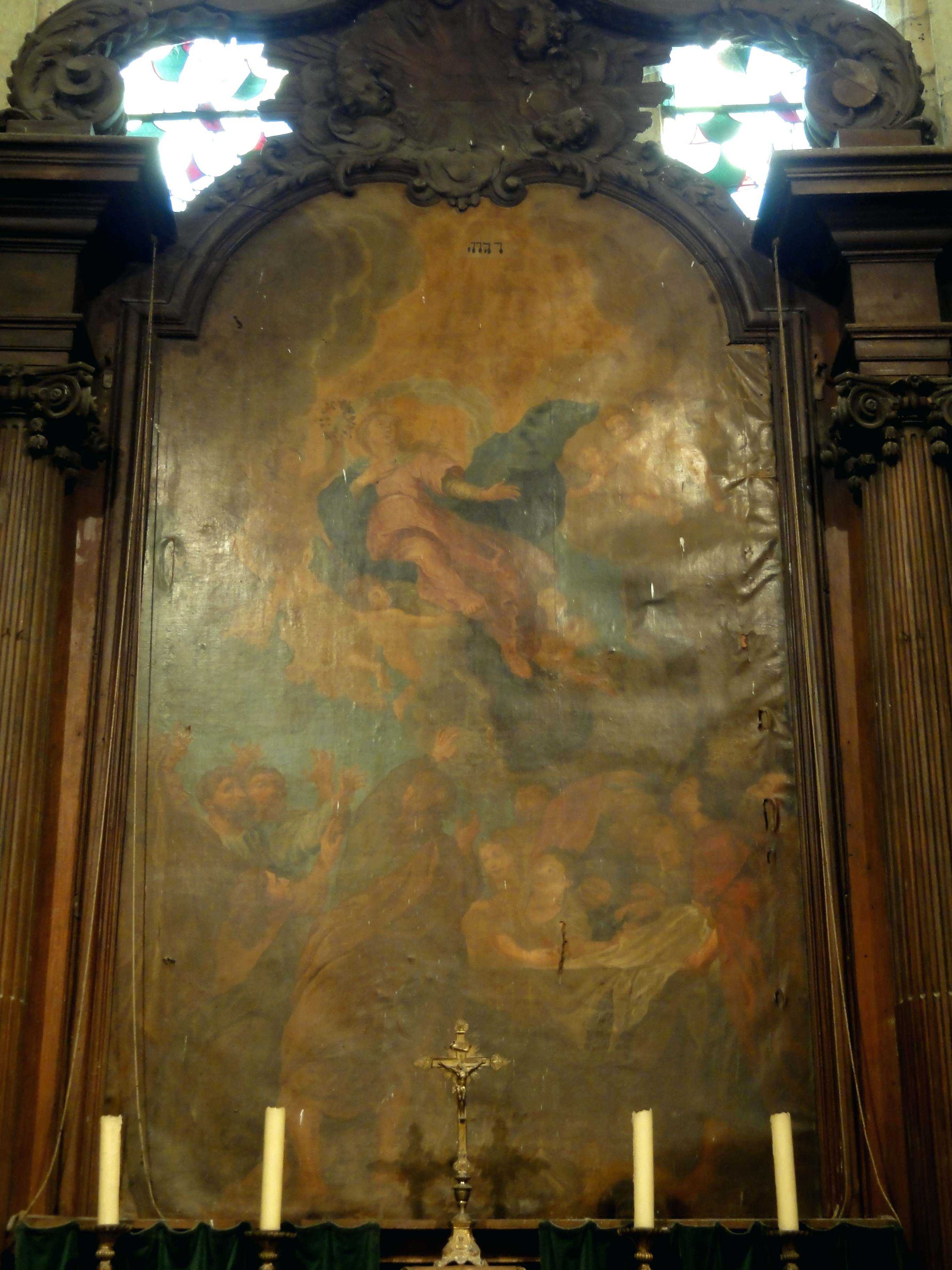 Mobilier de l'église (voir titre).